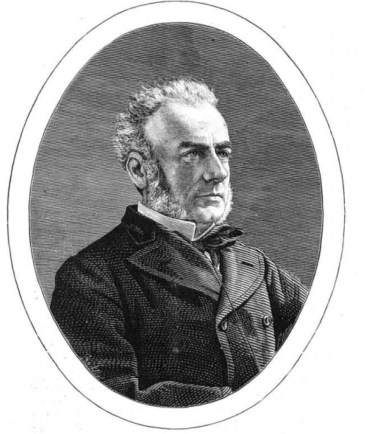 Contraalmirante Miguel Lobo y Malagamba. Grabado de La Ilustración Española y Americana el 30 de junio de 1876